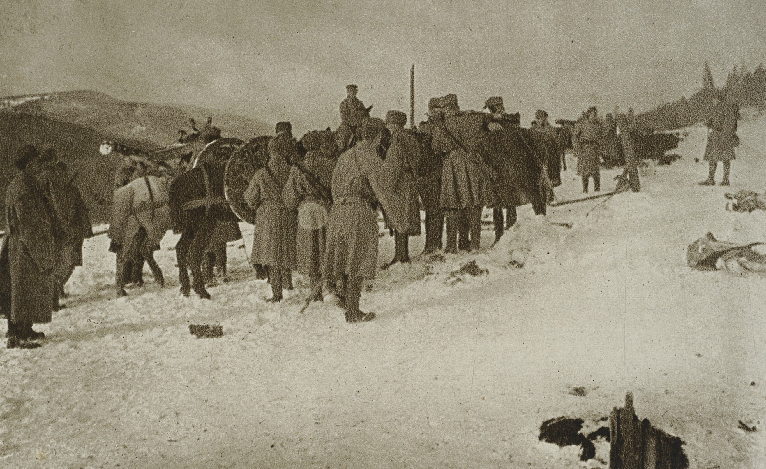 Artyleria górska (działa M.75) II Brygady Legionów Polskich. Gorgany.